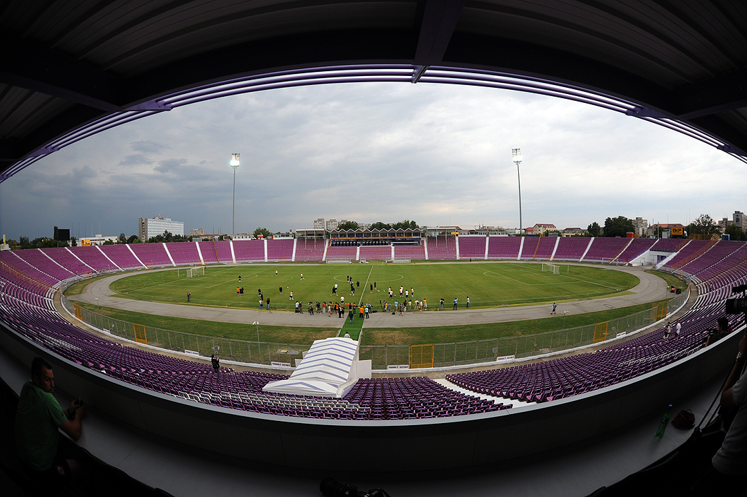 Stadionu Dan Paltinisan